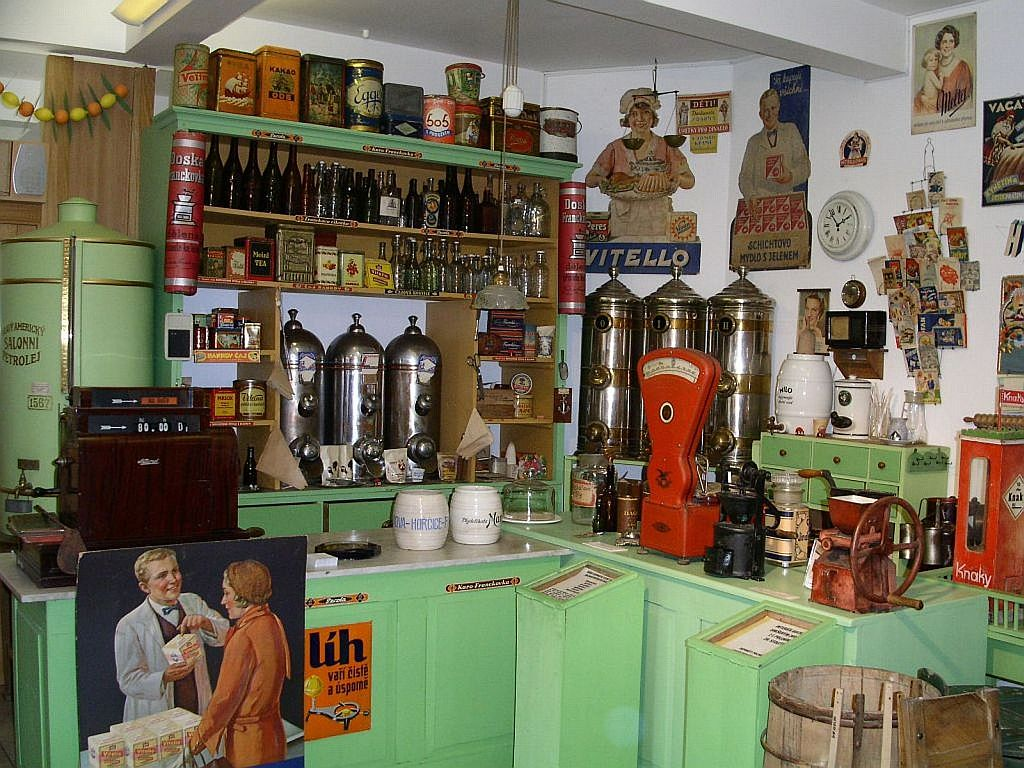 Stálá expozice kupeckého krámu z první poloviny 20. století.